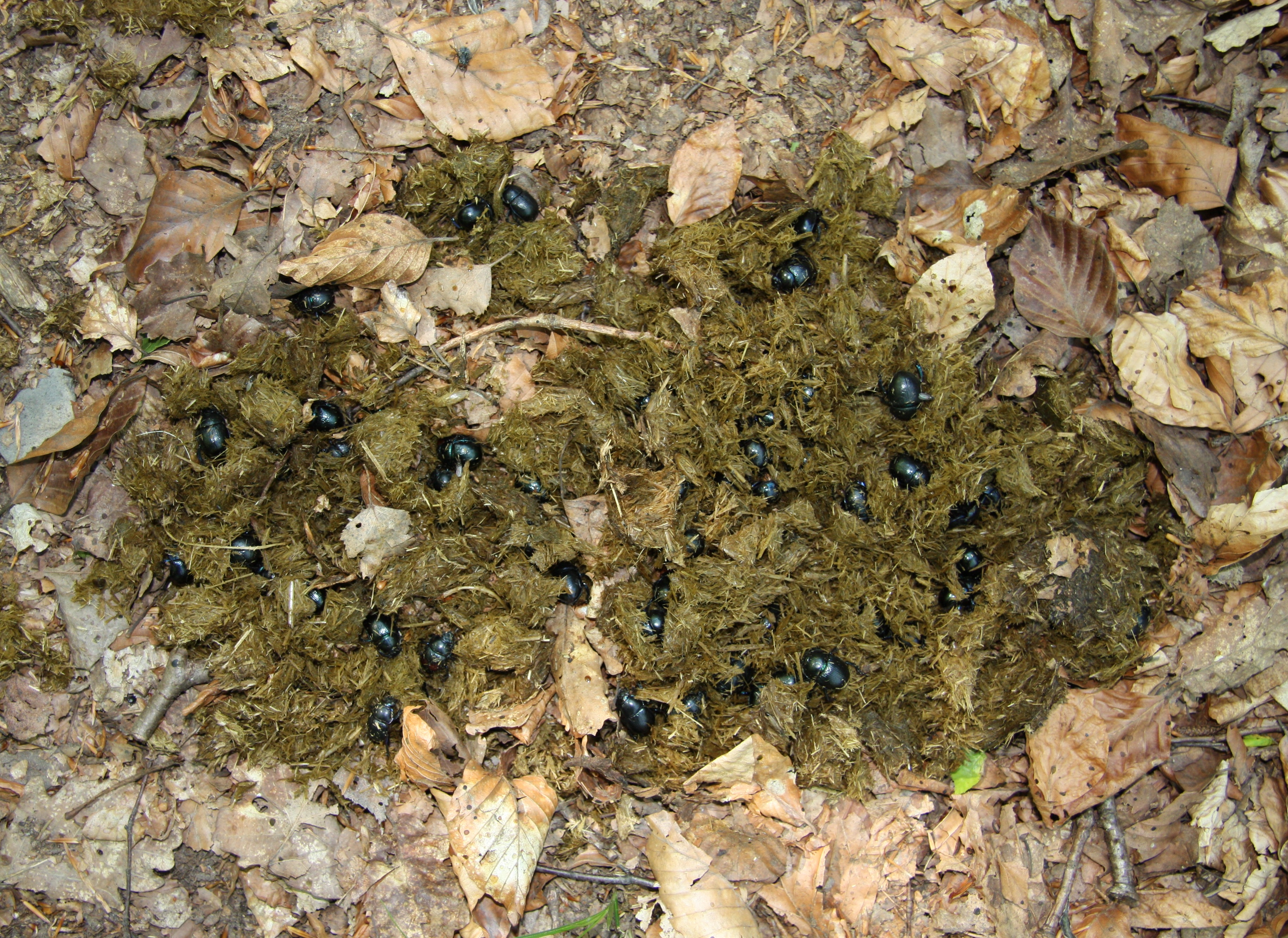 Anoplotrupes stercorosus